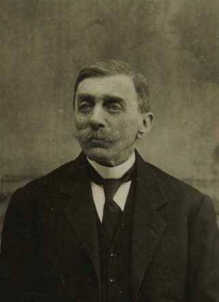 Портретна фотография на Ян Щолцман, полски зоолог и пътешественик